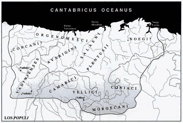 Mapa de las distintas tribus cántabras prerromanas de origen celta que poblaban la zona central del norte de la península iberica.